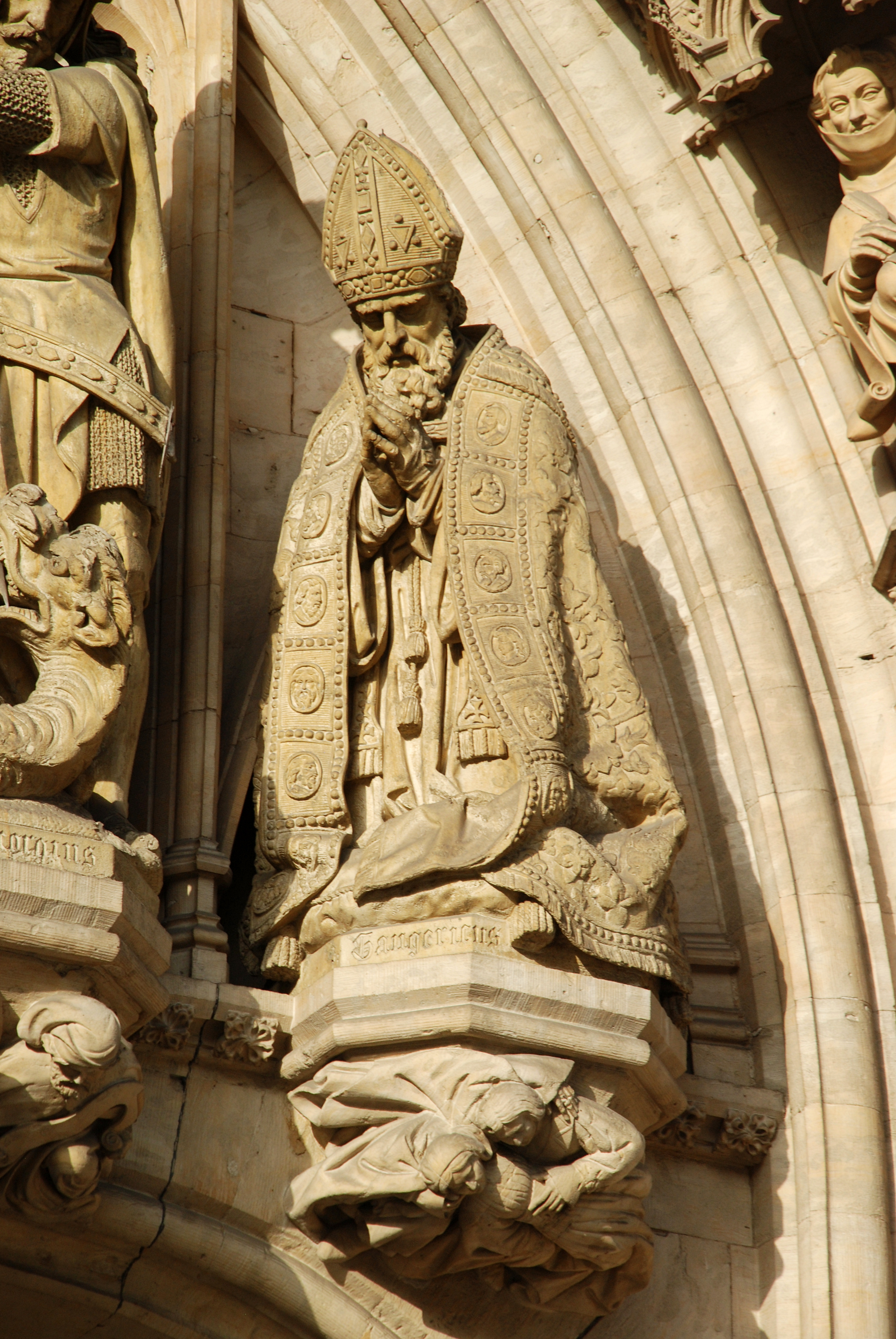 Belgique - Bruxelles - Hôtel de ville de Bruxelles - Portail - Tympan - saint Géry